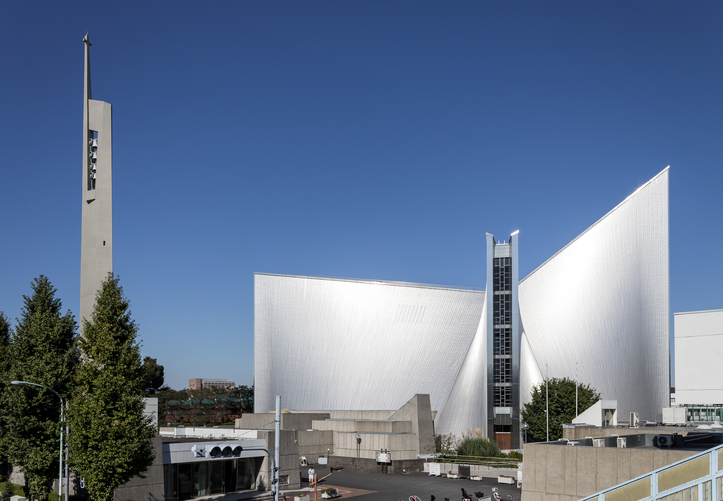 東京カテドラル聖マリア大聖堂（東京都文京区）、 Tange Kenzo.